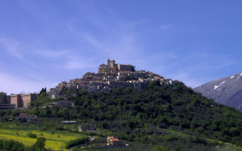 Panorama di Casoli (Chieti)